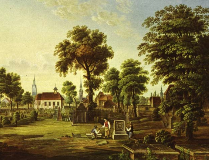 von Norden gesehen, im Hintergrund die Nikolaikapelle sowie die Türme der Marktkirche, Kreuzkirche und der Neustädter Kirche